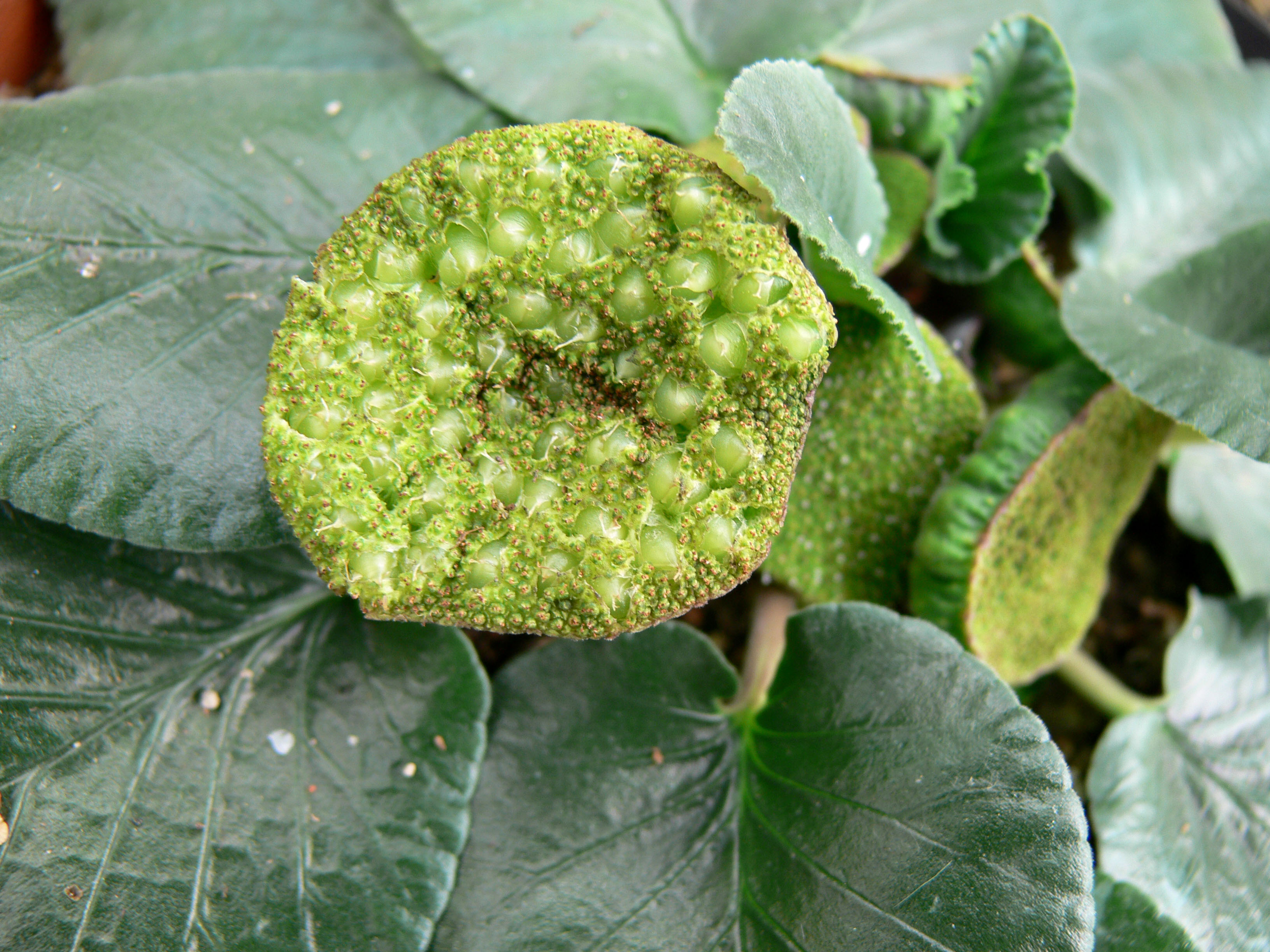 Dorstenia brasiliensis Lam. Familie Moraceae, Südamerika, Trinidad, Tobago. Aufnahme aus dem botanischen Garten der Ruhruniversität Bochum